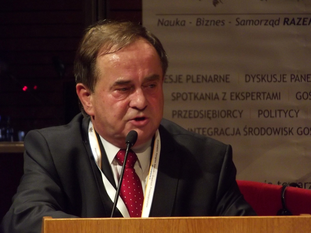 Zdjęcie zrobione podczas II Europejskiego Kongresu Małych i Średnich Przedsiębiorstw w Katowicach.